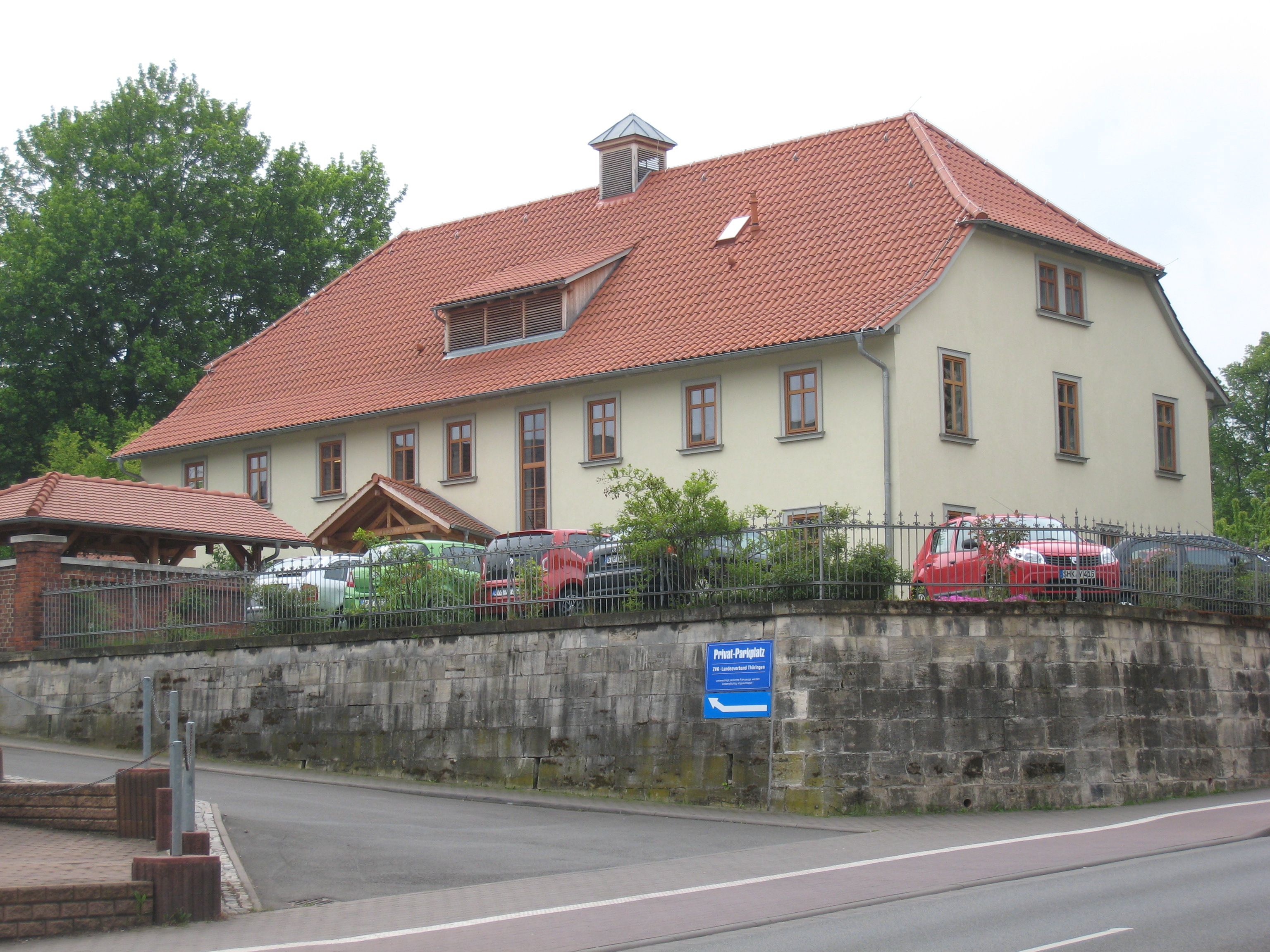 Altes Forsthaus in Arnstadt.